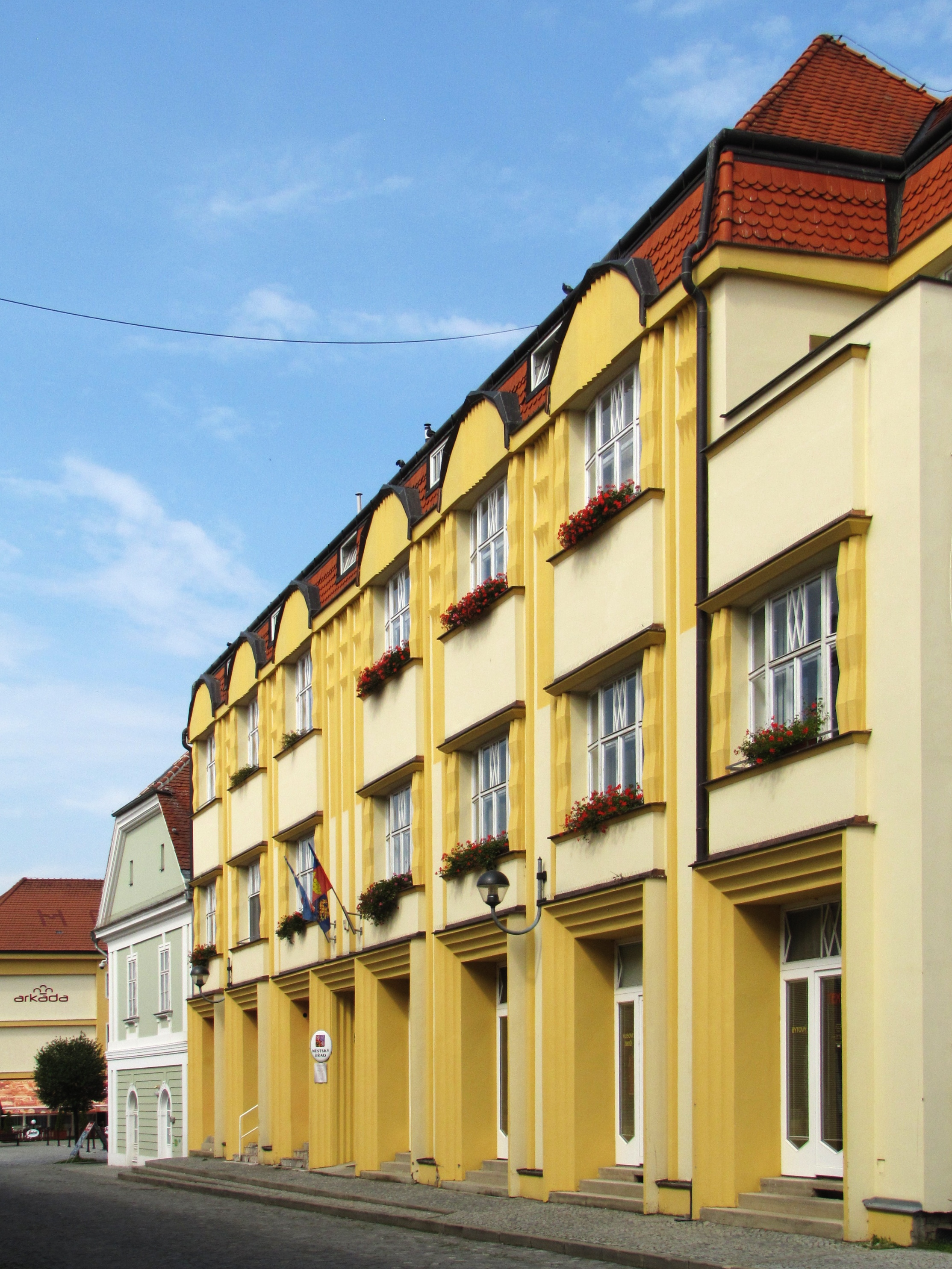 Radnice v Bučovicích